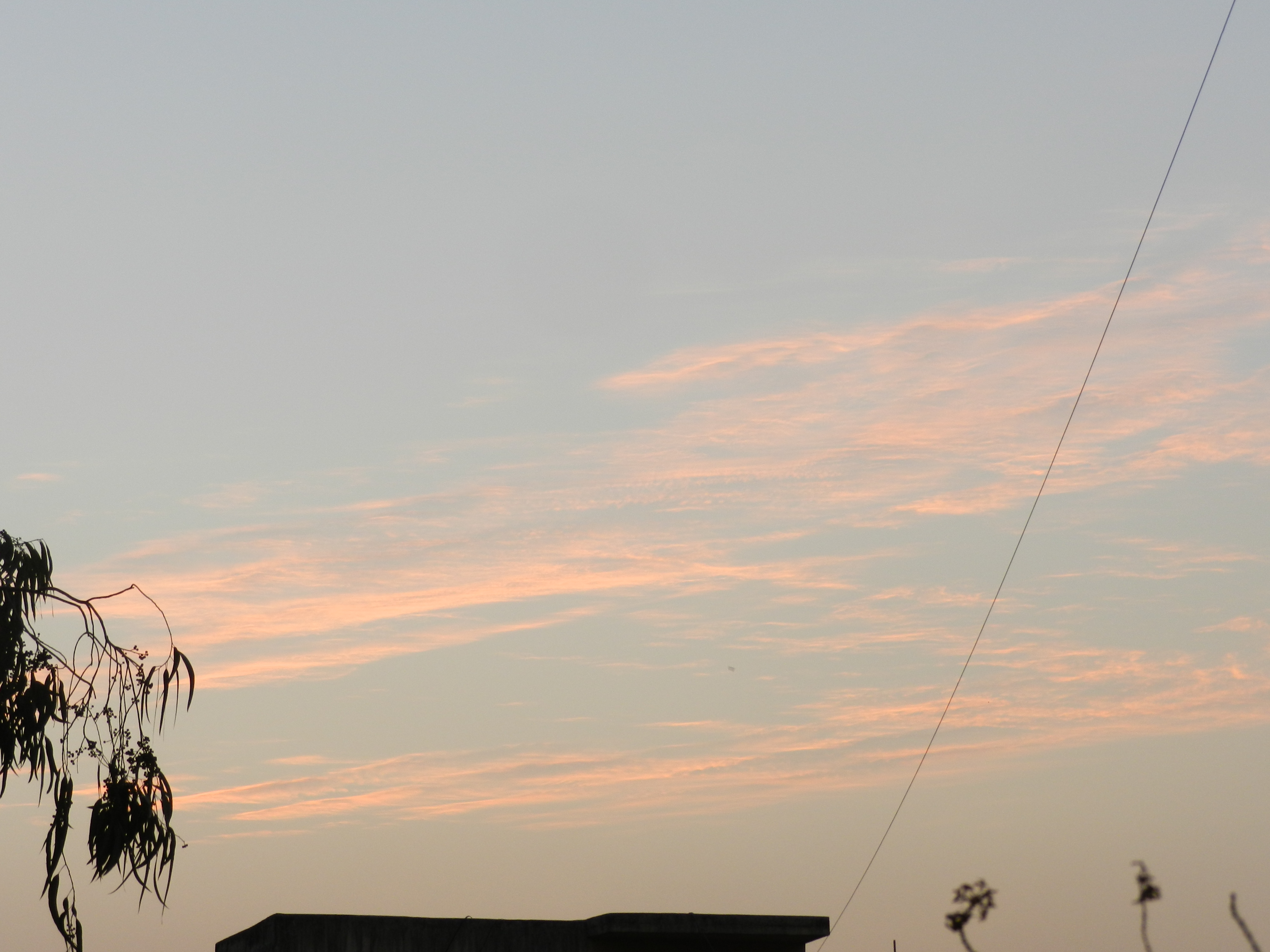 सायंकाळी पुण्यातील आकाशातील तंतुमेघ